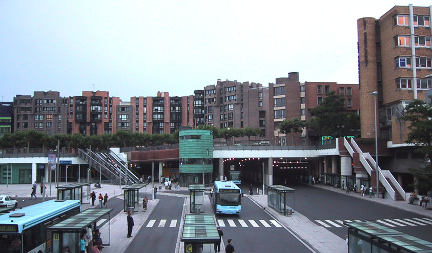 vue de la gare routière de Cergy-Préfecture